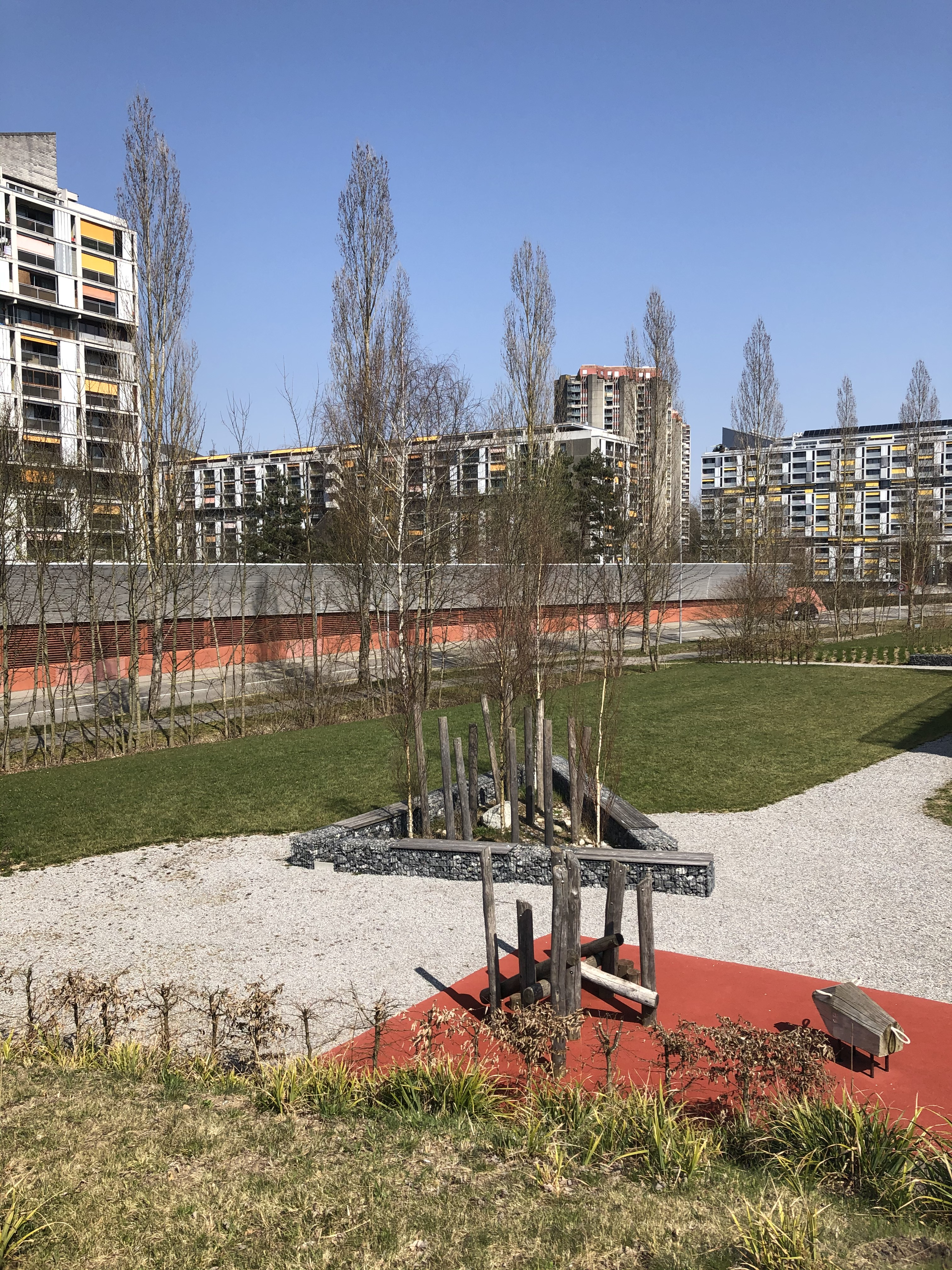 Gäbelbach Hochhausblick von Brünnen aus